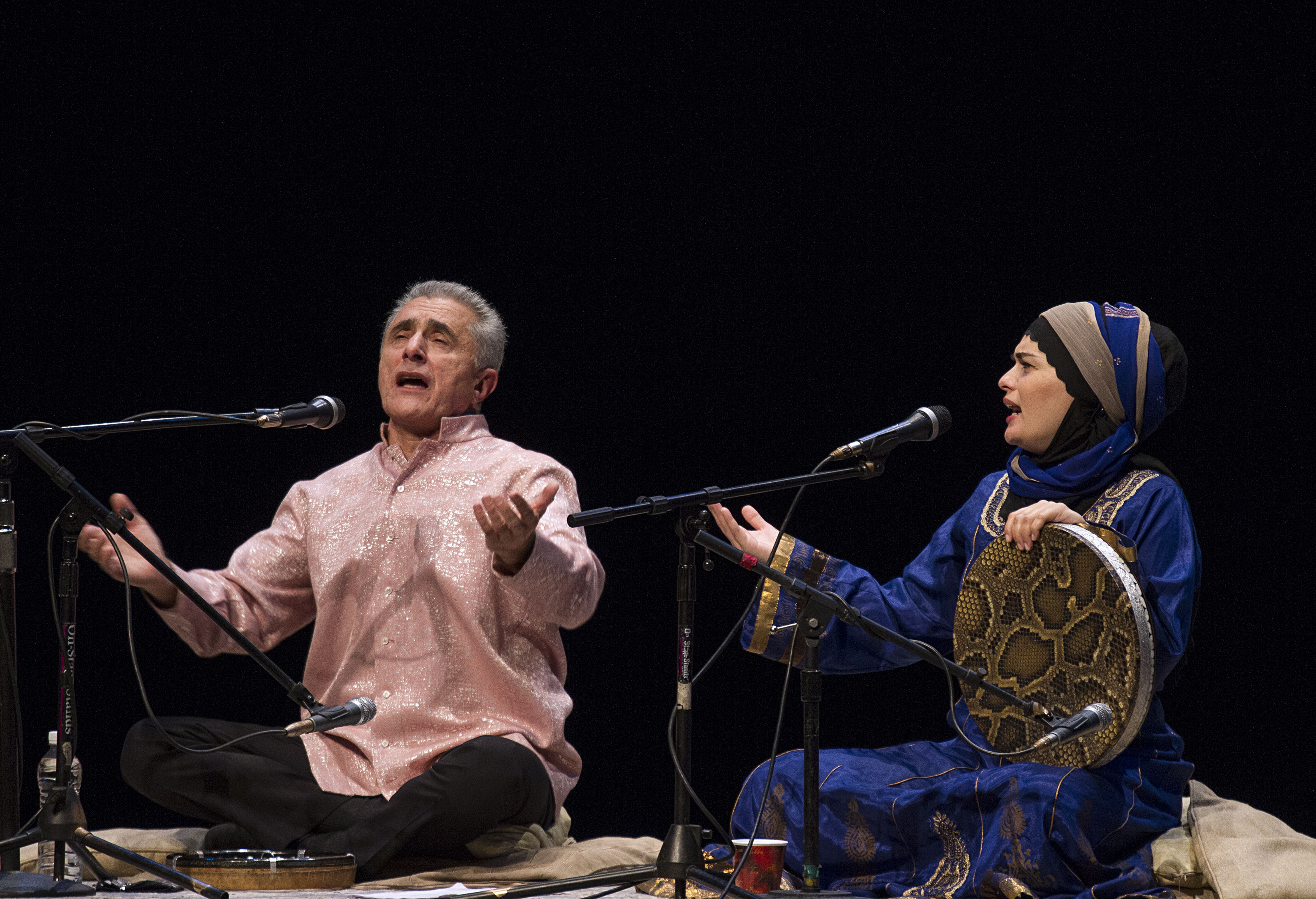 Lunes 20 de Octubre 2014. Como parte de las Actividades del 42 Festival Internacional Cervantino se presento el cantante Alim Qasimov, con el Programa Mugham Canto Sagrado de Azerbaiyan en el Teatro de la Ciudad Esperanza Iris. Foto: Tania Victoria / Secretaria de Cultura